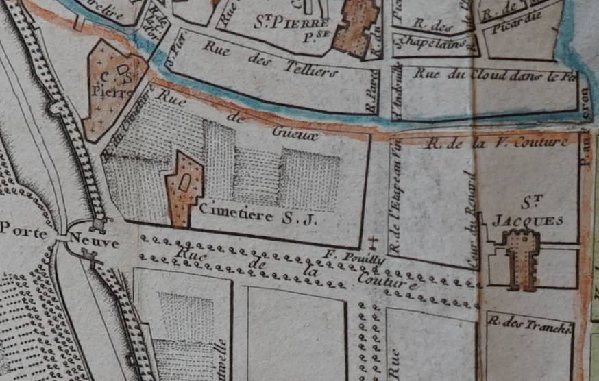 issu du fonds iconographique de la bibliothèque municiaple de Reims.